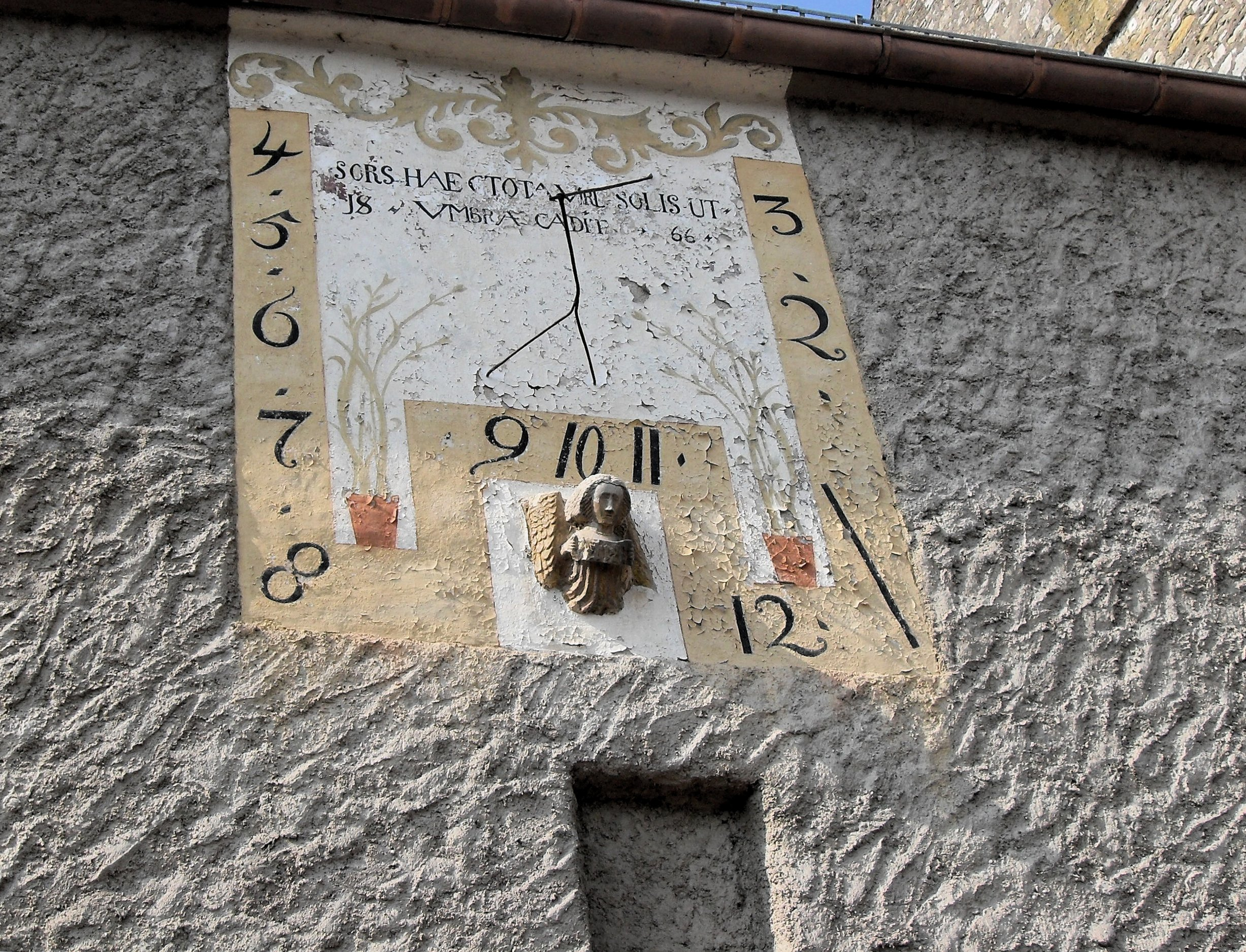 Steinbrunn-le-Haut, Cadran solaire à l'église de Saint-Maurice